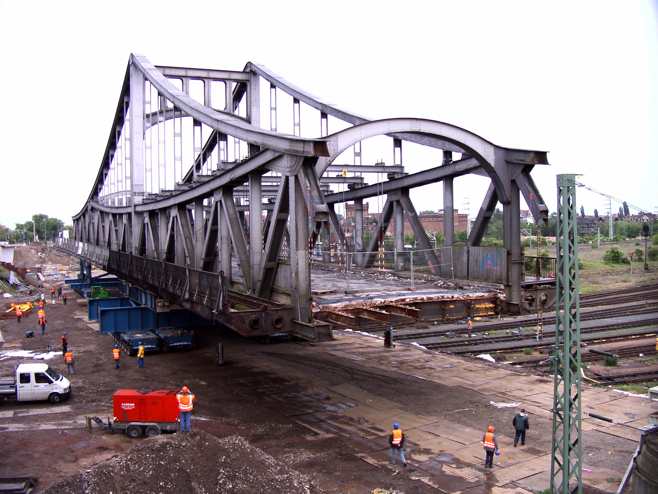 Brückenteil der "Alten Berliner Brücke" wird mit Tiefladern abtransportiert